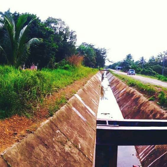 gambar di ambil di kawasan parit air Kampung Telaga Mas, Rantau Panjang.